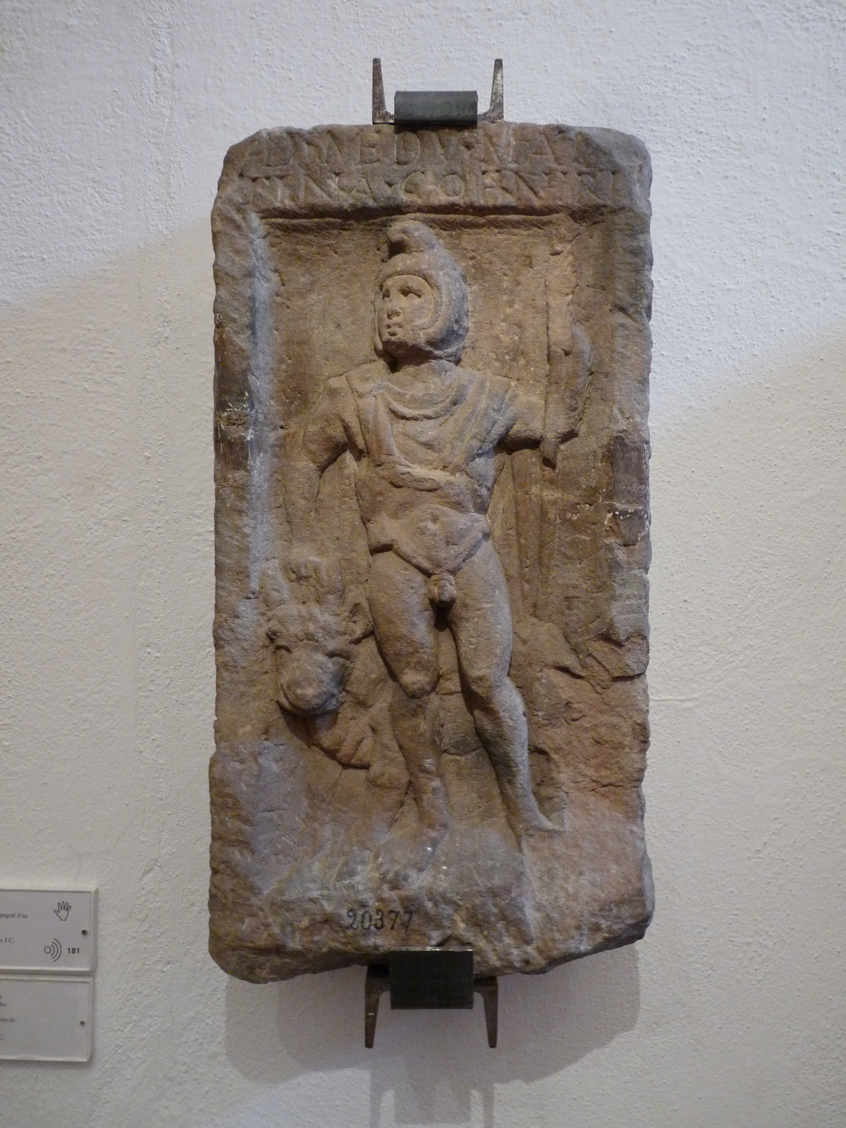 Stèle représentant Mars Mider, accompagné d'un taureau. Début du 3e siècle après JC. Trouvé dans la forêt de Hauguenau. Musée archéologique de Strasbourg